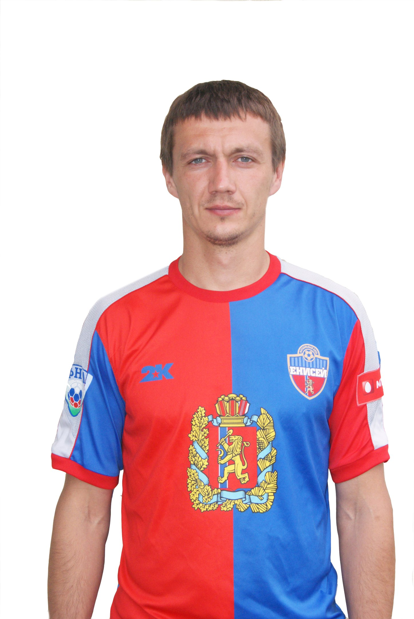 Футболист Качан Евгений Михайлович